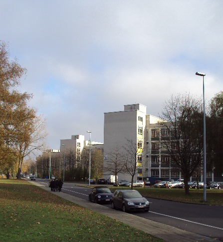 Sterre (campus) - UGent